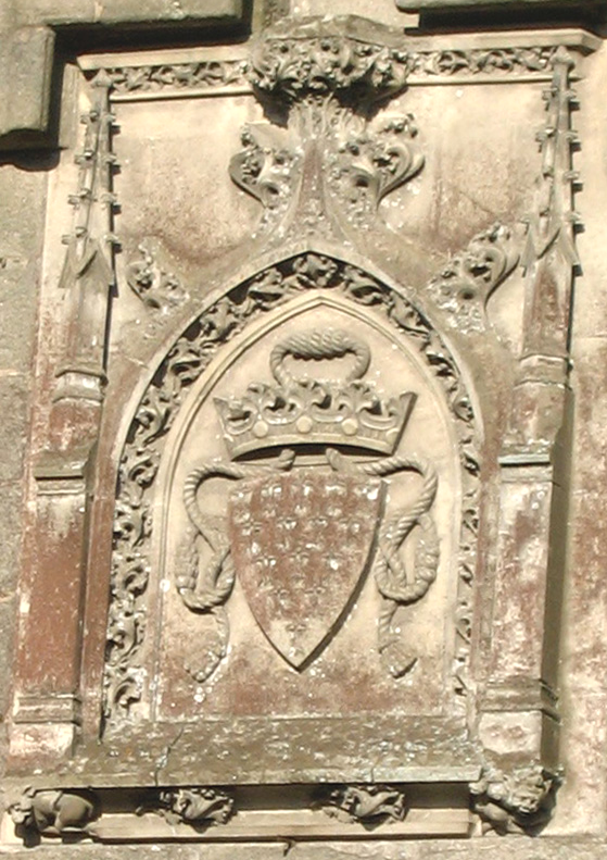 Blason en pierre de la Porte Vannetaise, à Guérande